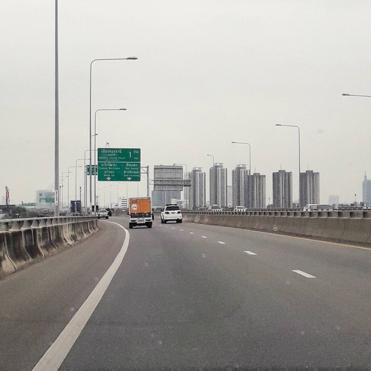 ทางพิเสษอุดรรัถยา บริเวณเมืองทแงธานี